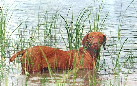 Vizsla